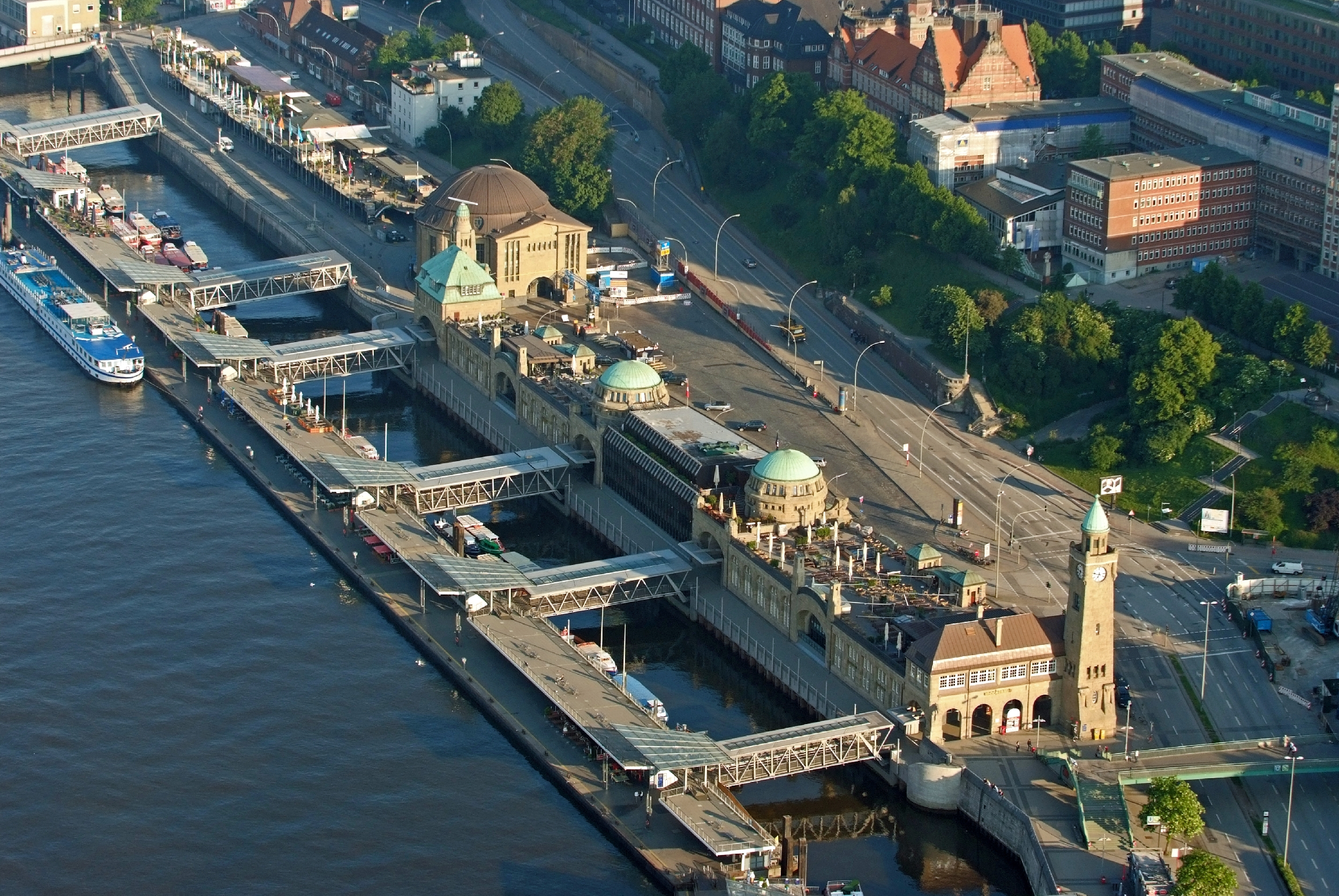 Projekt Heißluftballon Landungsbrücken